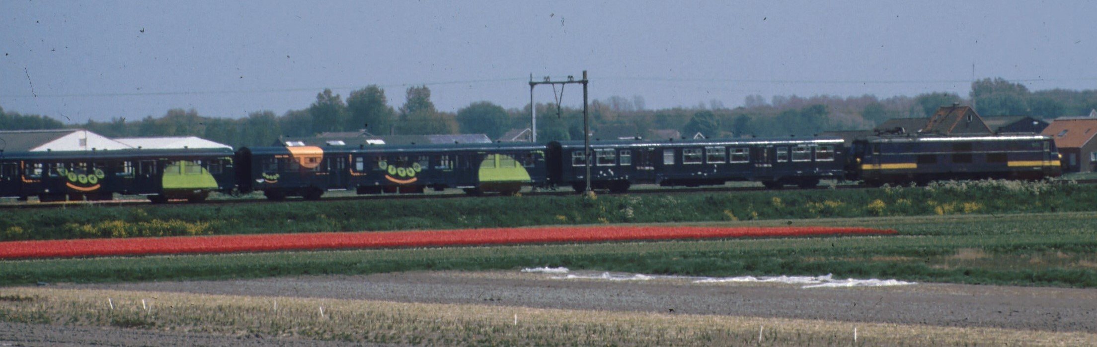 Lovers Optio train met BE 255x loc. Hillegom